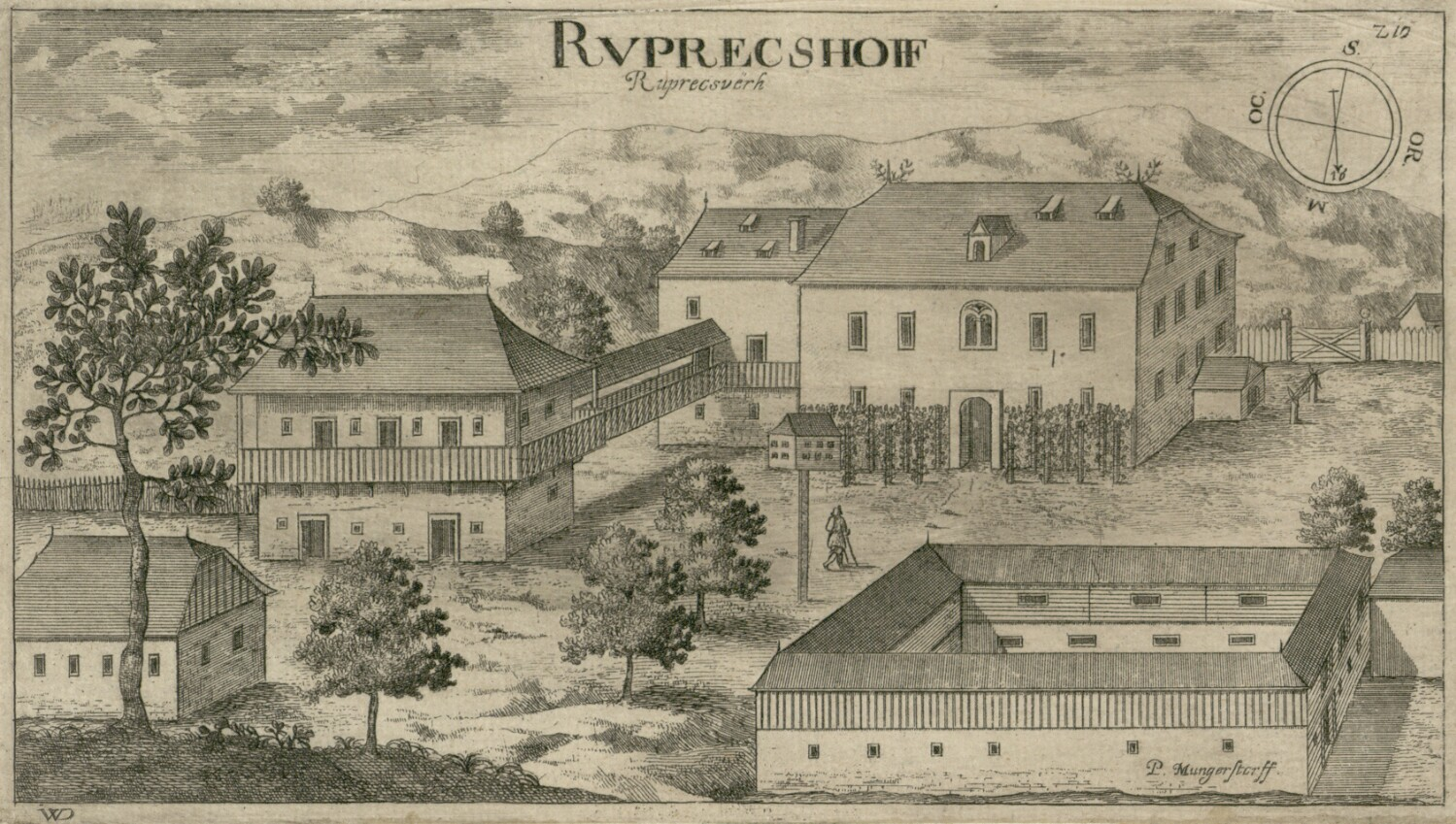 Dvorec Ruperčvrh